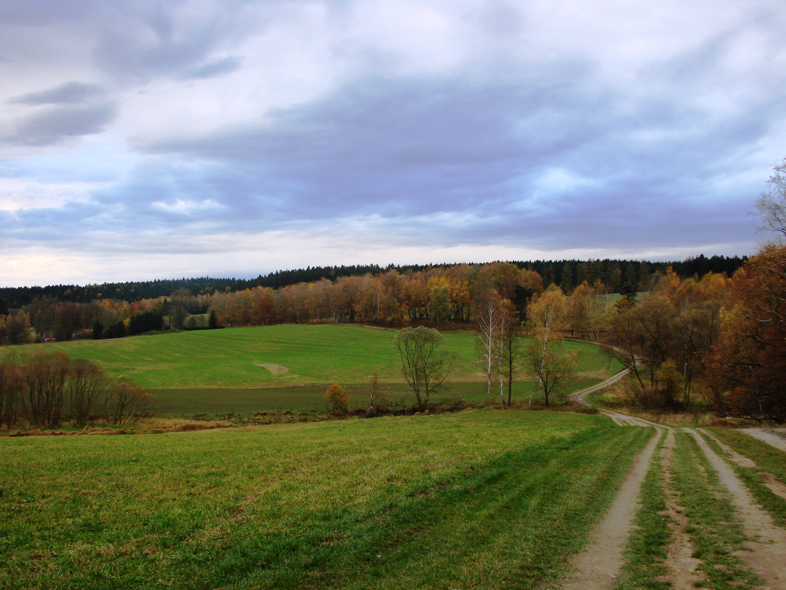 Cesta ke Skořetínu, bývalému poplužnímu dvoru, z Chotěboře. Vlevo v dáli je již vidět zahrada, která Skořetín obklopuje.